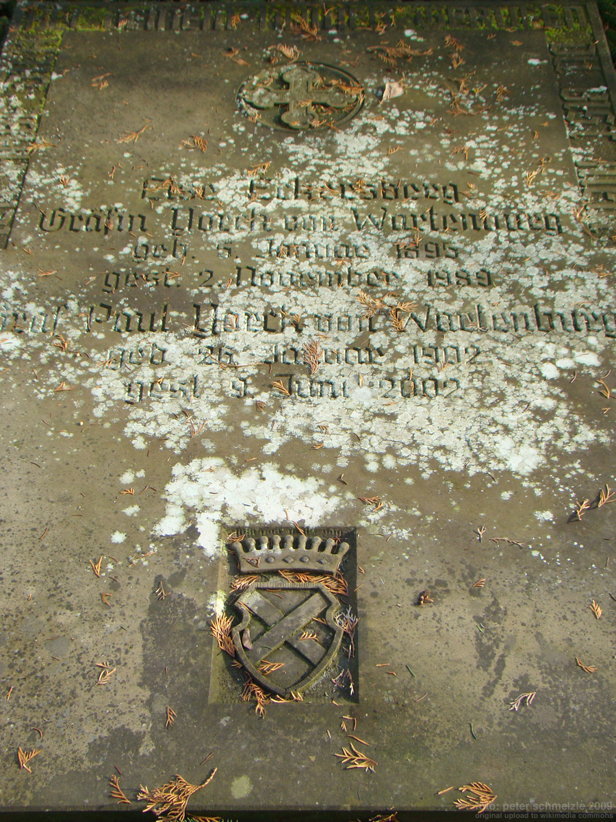 Grabstein von Paul Graf Yorck von Wartenburg und seiner Frau Else Eckersberg in der Berlichingen-Gablege auf dem Friedhof von Jagsthausen